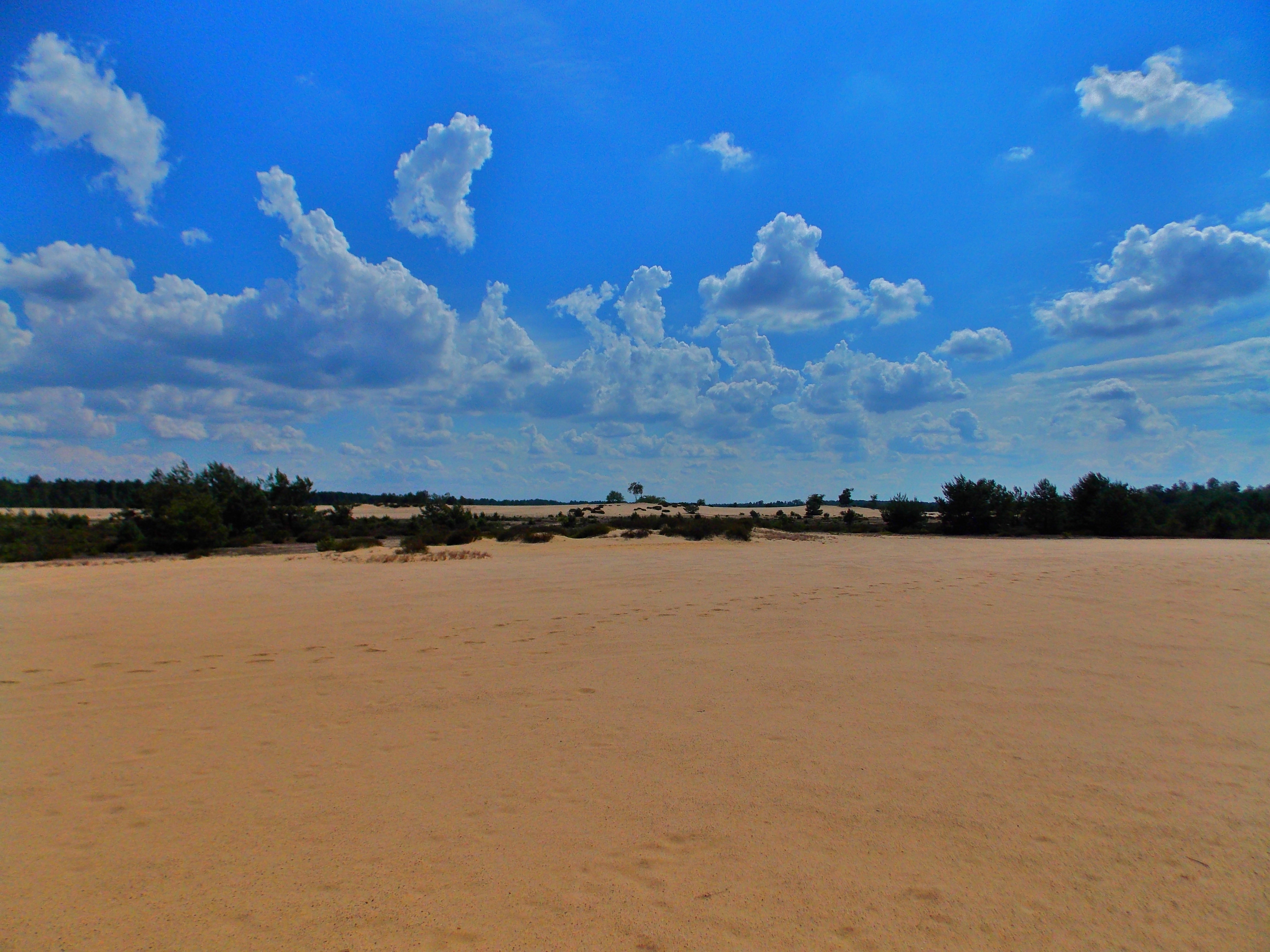 Wydma w centralnej części